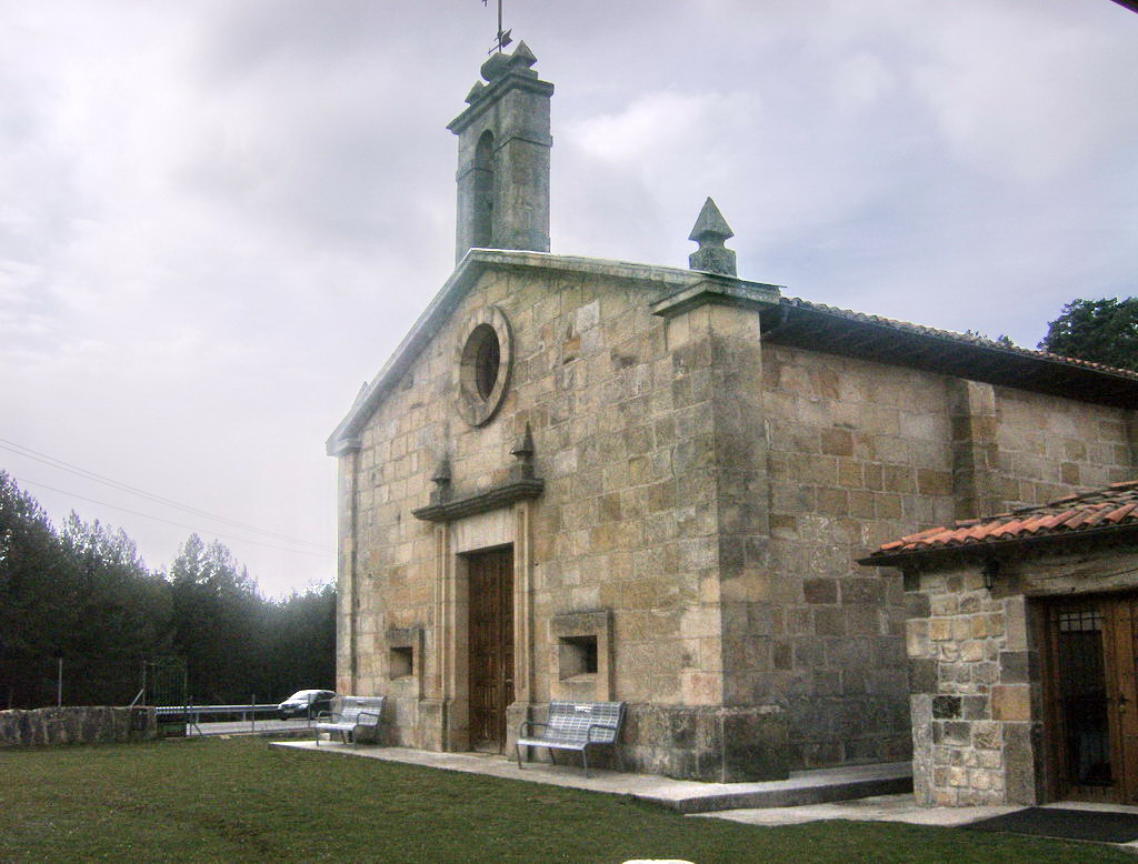 Municipio de Canicosa de la Sierra, en Burgos (España)